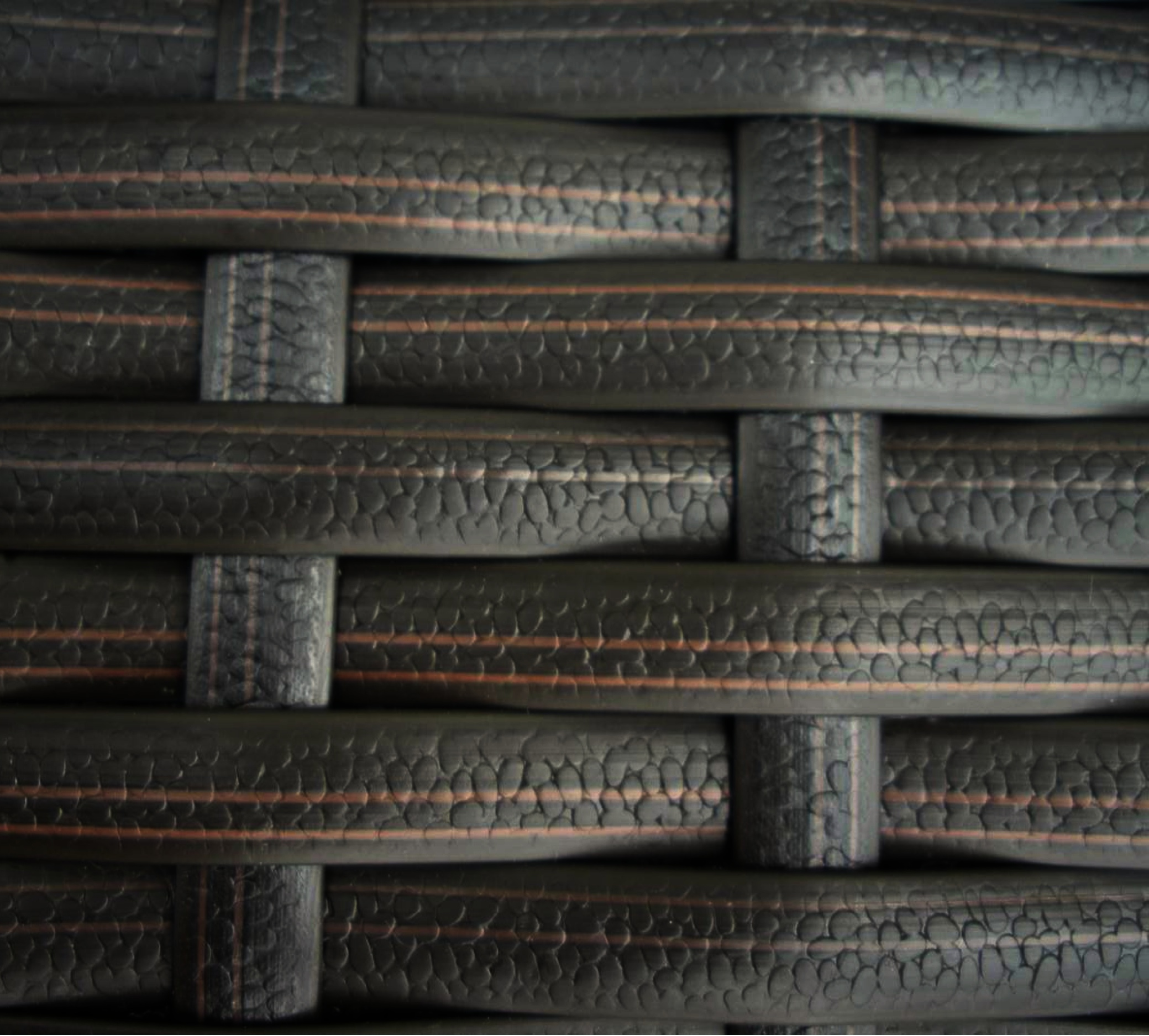 Resin Wicker Close Up